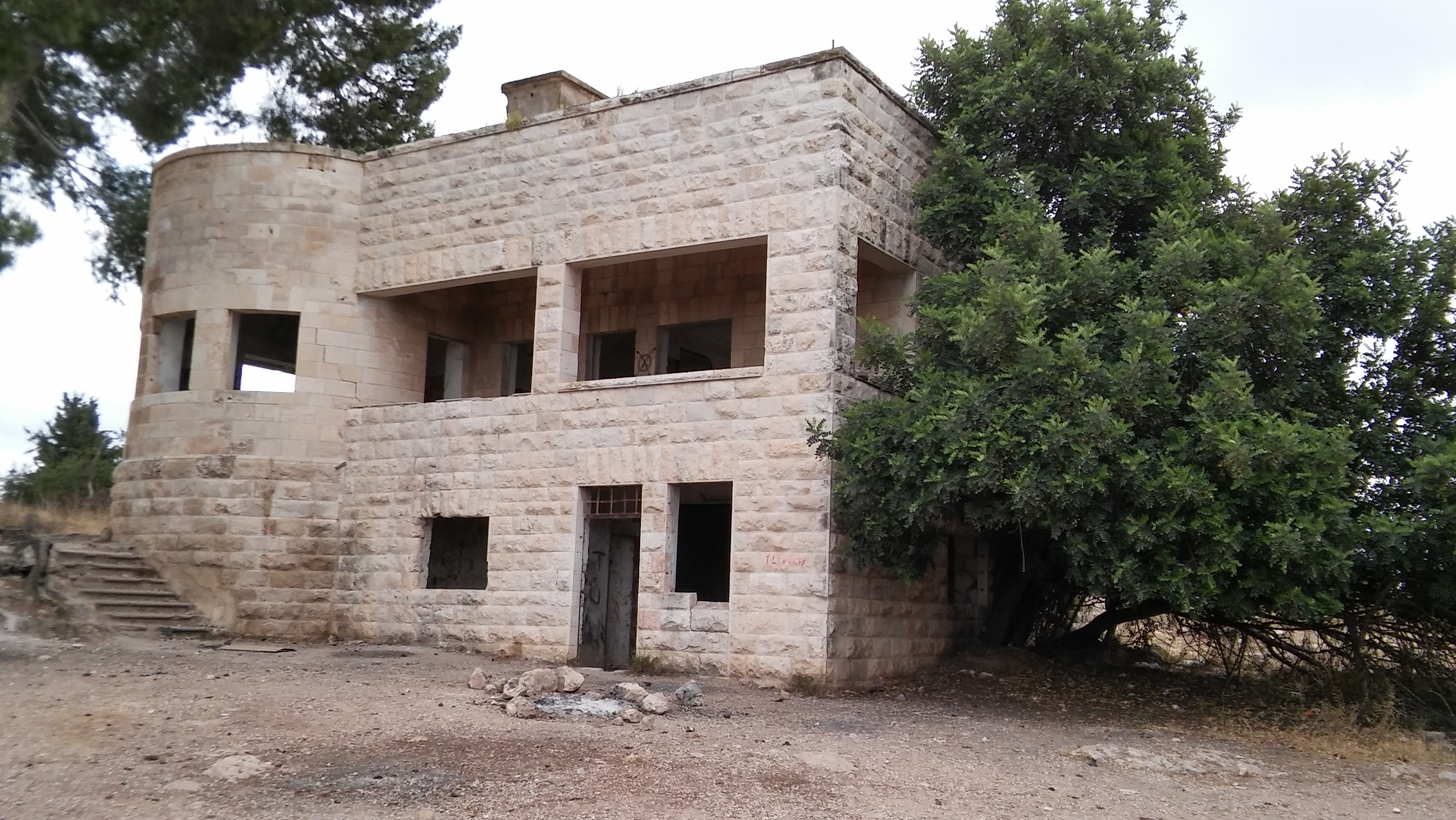 וילה אל-עזי בית גוברין